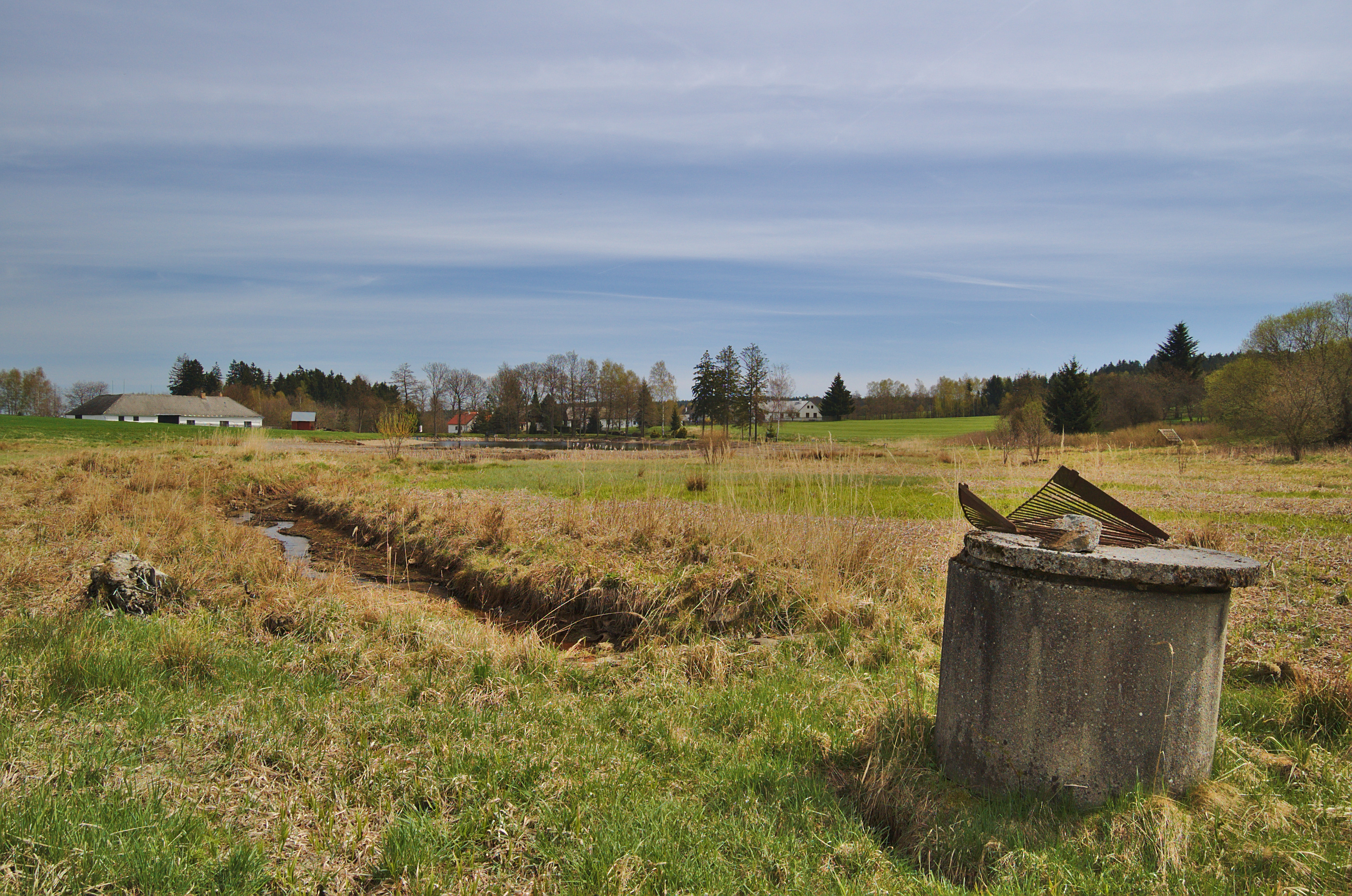 Pohled na osadu od západu, Hojava, Lidmaň, okres Pelhřimov Project: Fotíme Česko